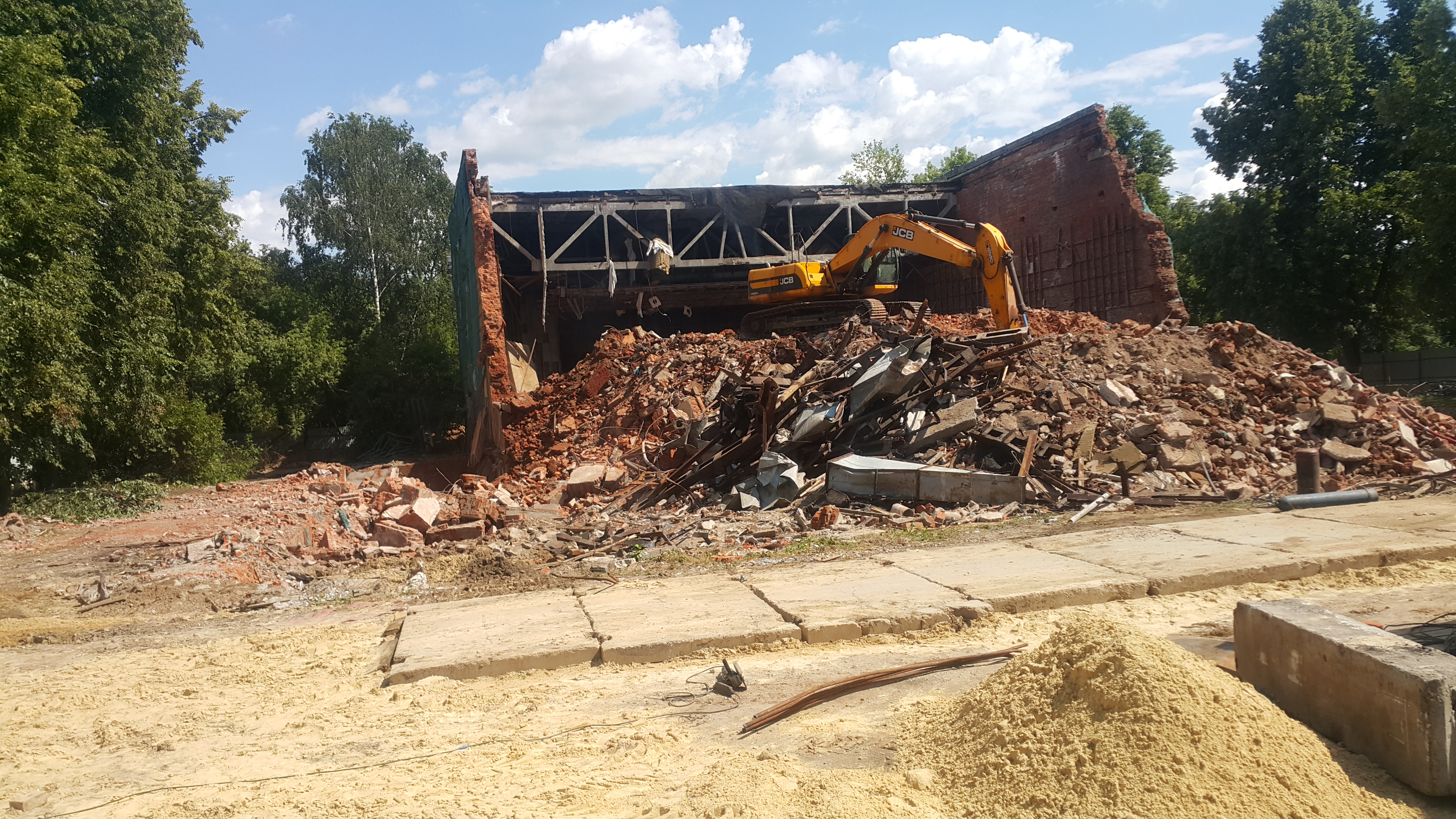 Снос кинотеатра "Планета" в июне 2019